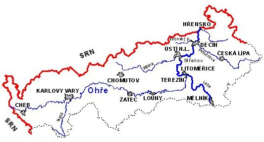 Karte über den Verlauf der Eger in Tschechien Zeichner/Urheber: Vaclav.prasil (für die GNU-FDL)